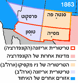 Arizona new mexico territories 1863